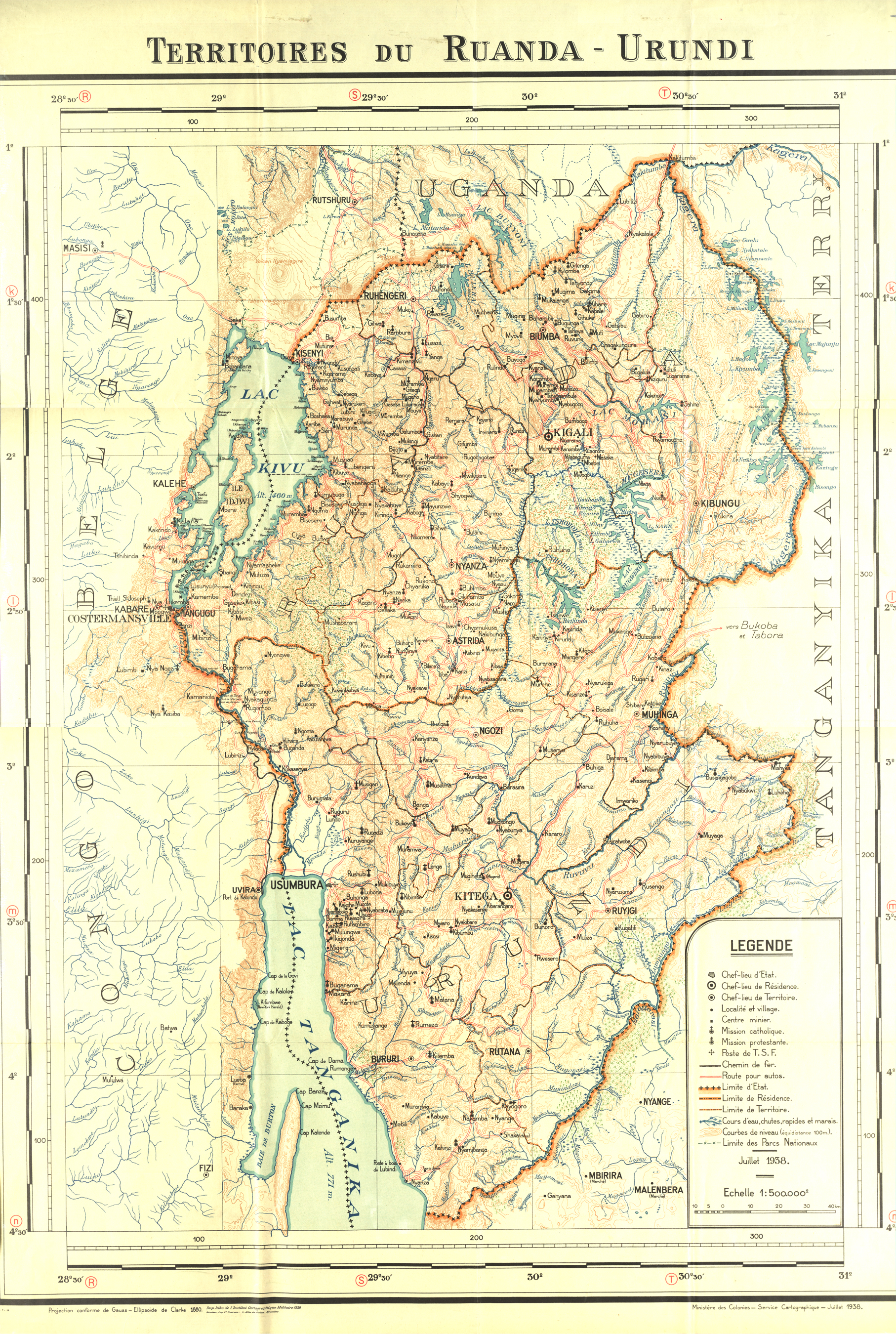 Territoires du Ruanda-Urundi 1929-1938